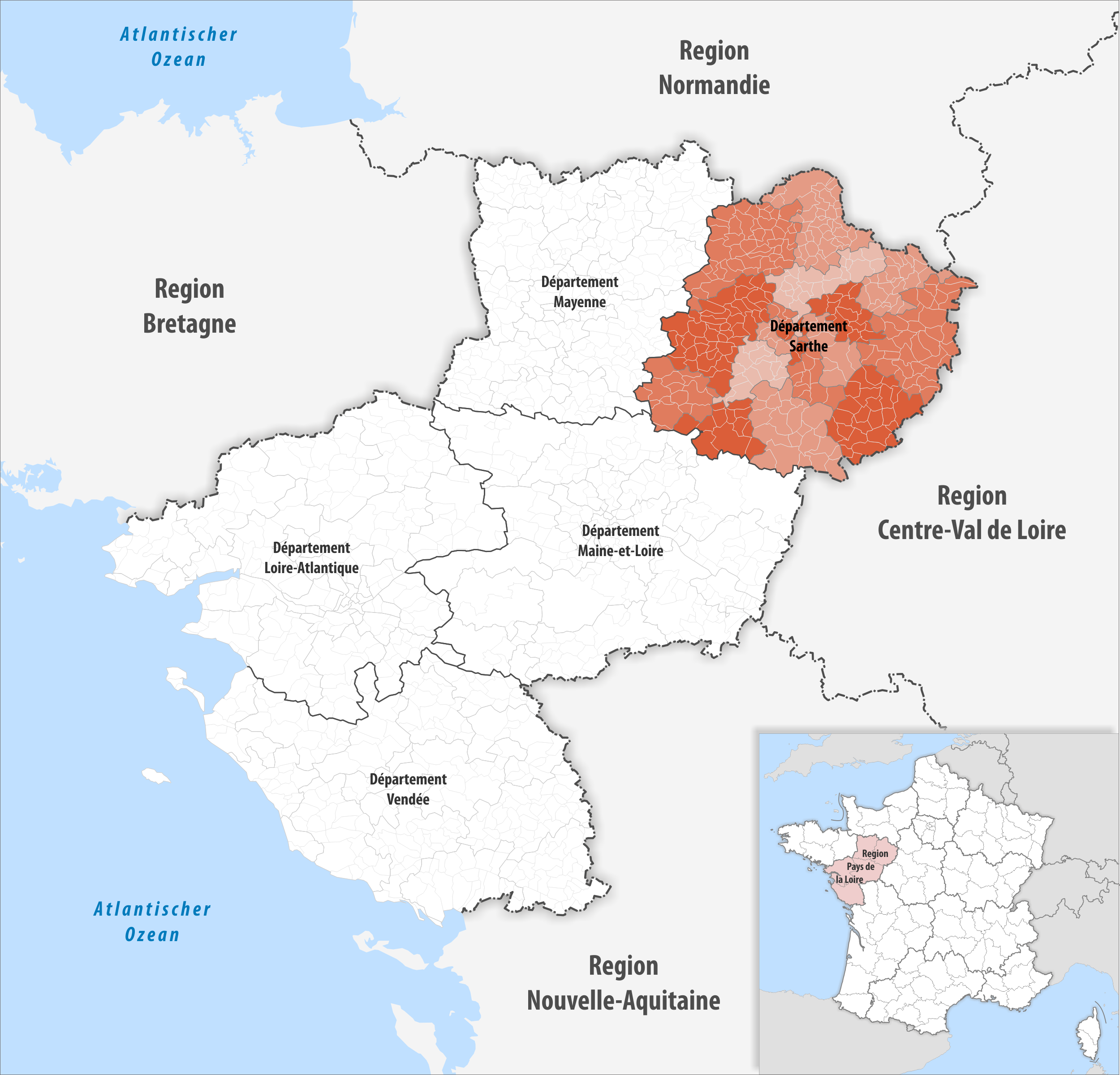 Lage des Departements Sarthe